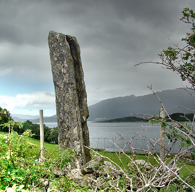 Bautastein på Indre Steinnes i Ørsta kommune